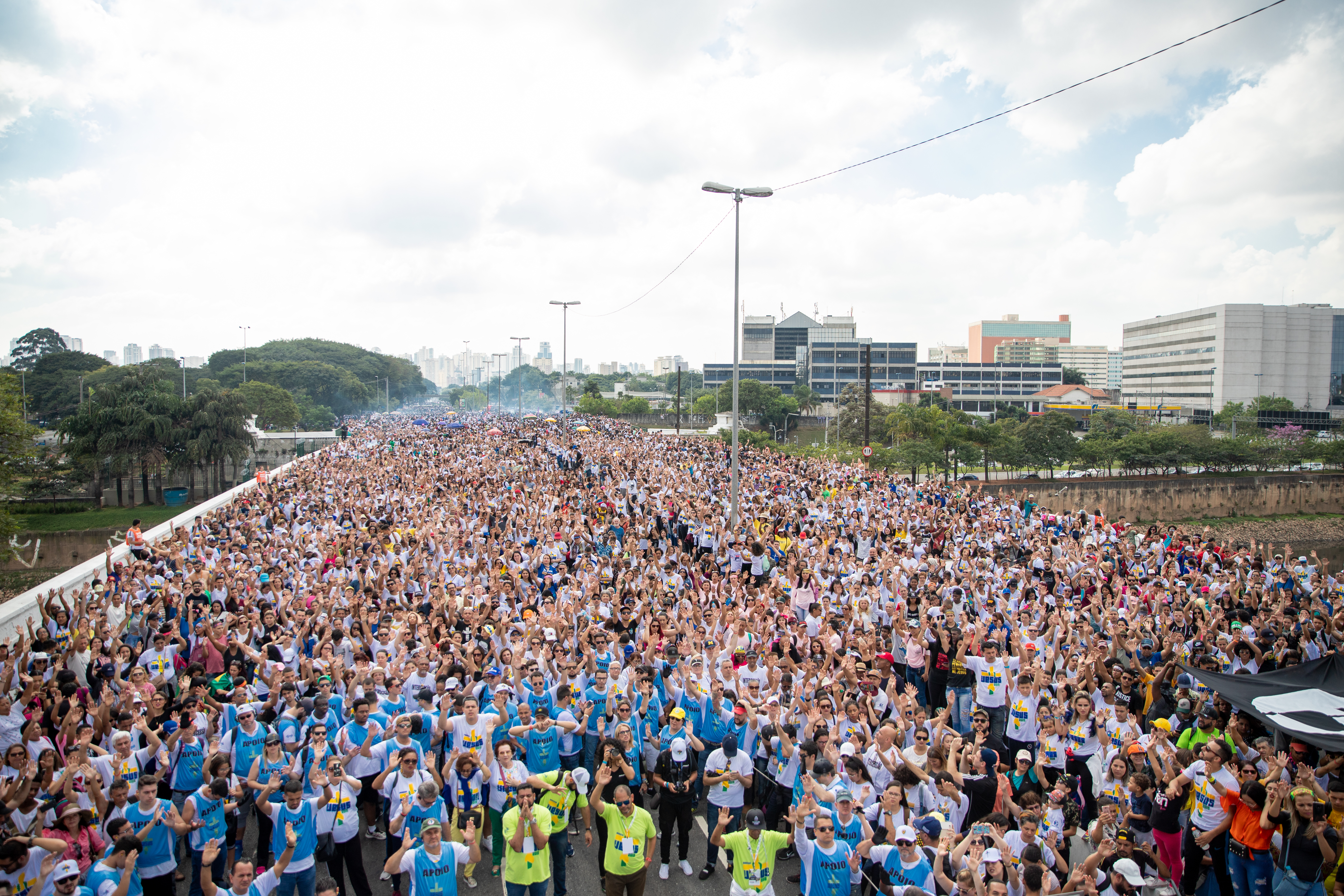 O governador do Estado de São Paulo, João Doria, participa da Marcha para Jesus em São Paulo. Data:20/06/2019. Local: São Paulo. Foto: Governo do Estado de São Paulo